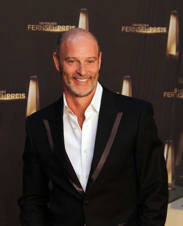 Simon Licht beim Deutschen Fernsehpreis 2012